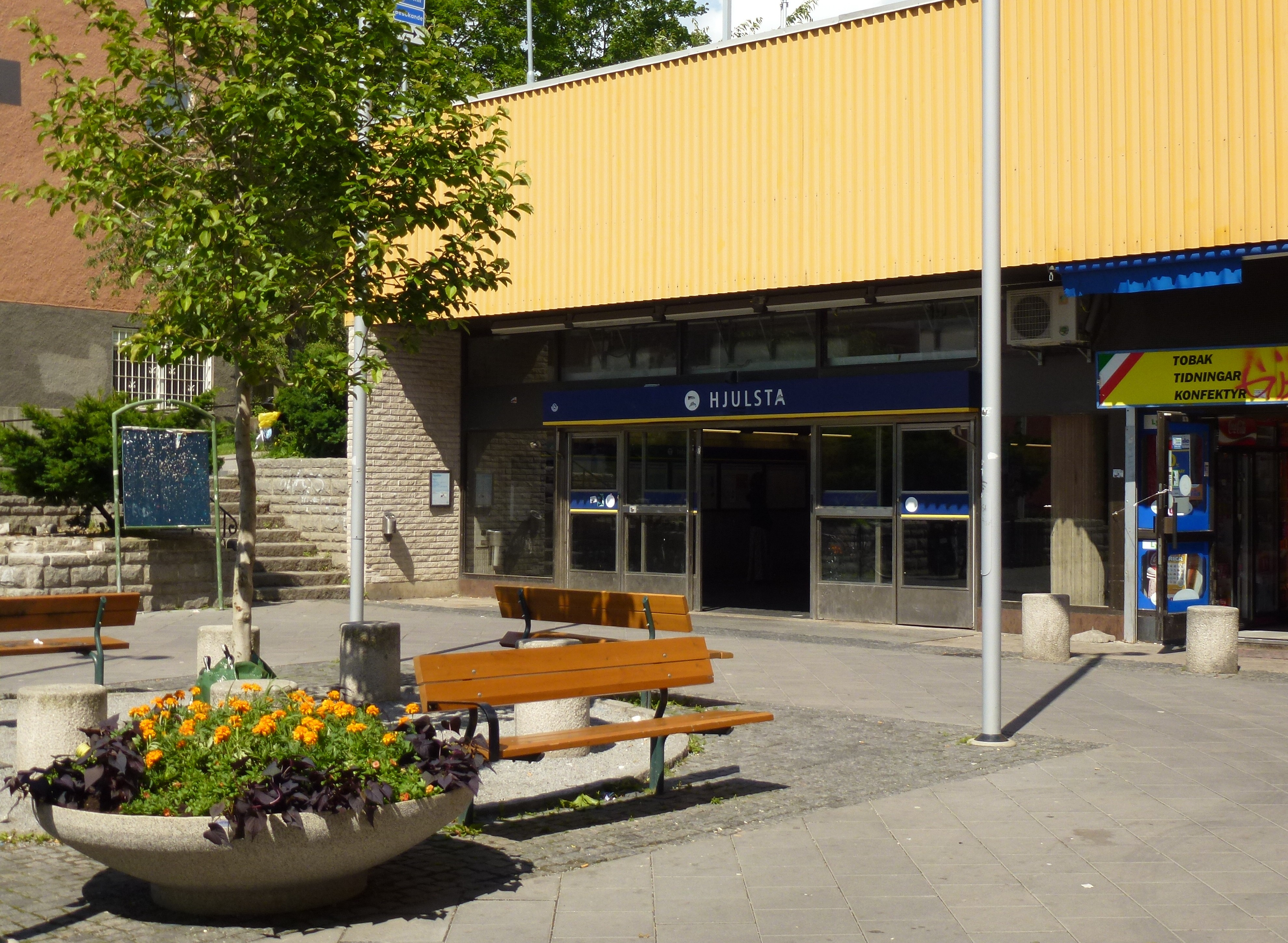 Hjulsta T-banestation, toret